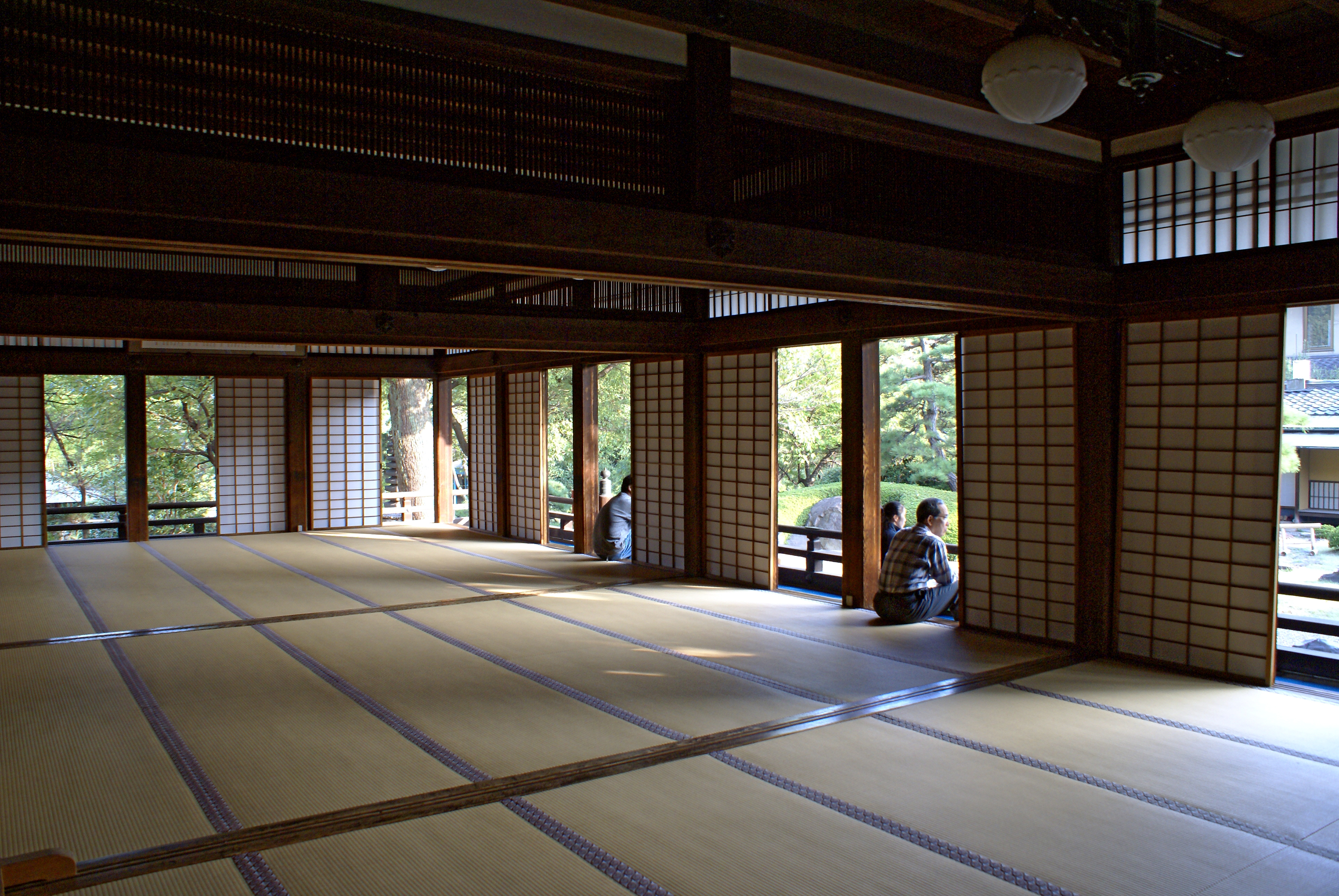 Shitennō-ji Honbo Garden in Osaka, Osaka prefecture, Japan